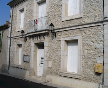 photo perso concernant la commune de Vacquières (Hérault, France)